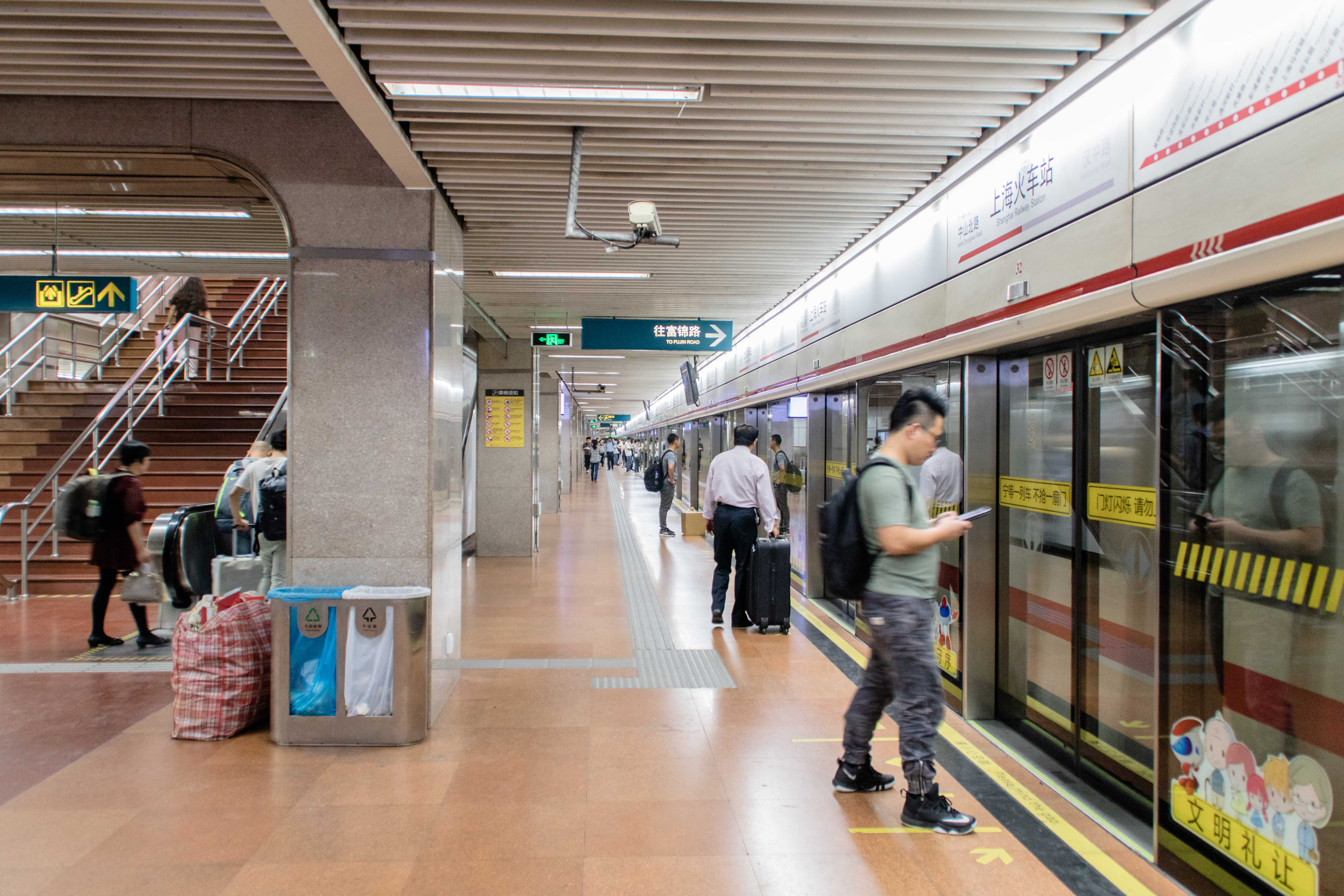 中文（中国大陆）: 上海火车站站1号线站台